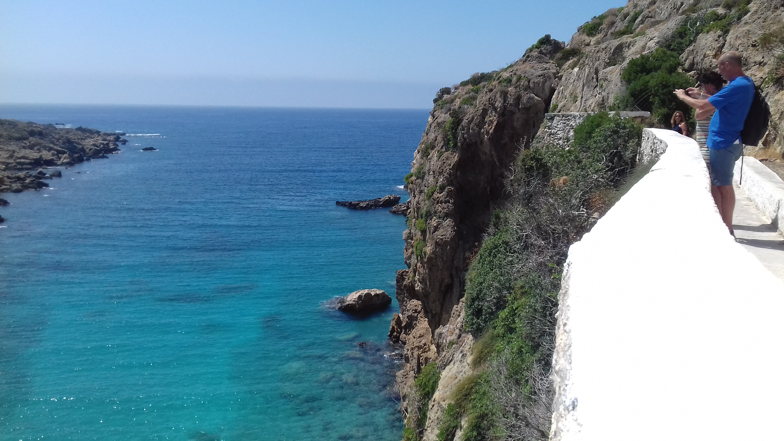 Στην φωτογραφία απεικονίζεται η θέα της θάλασσας από το μοναστήρι της Χρυσοσκαλίτισσας. This is a photography of Natura 2000 protected area with ID GR4340015